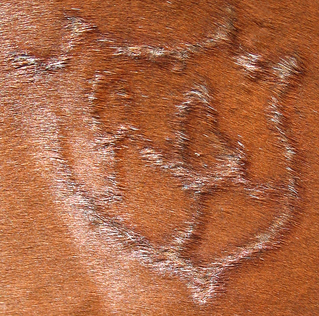 Anglo-Araber Brand